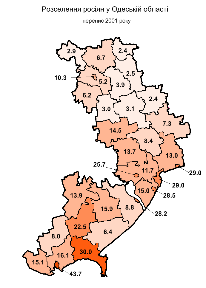 Розселення росіян в Одеській області за переписом 2001 р. / Russians in Odesa oblast, 2001 census